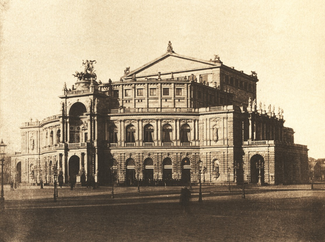 Der zweite Bau der Dresdner Semperoper.